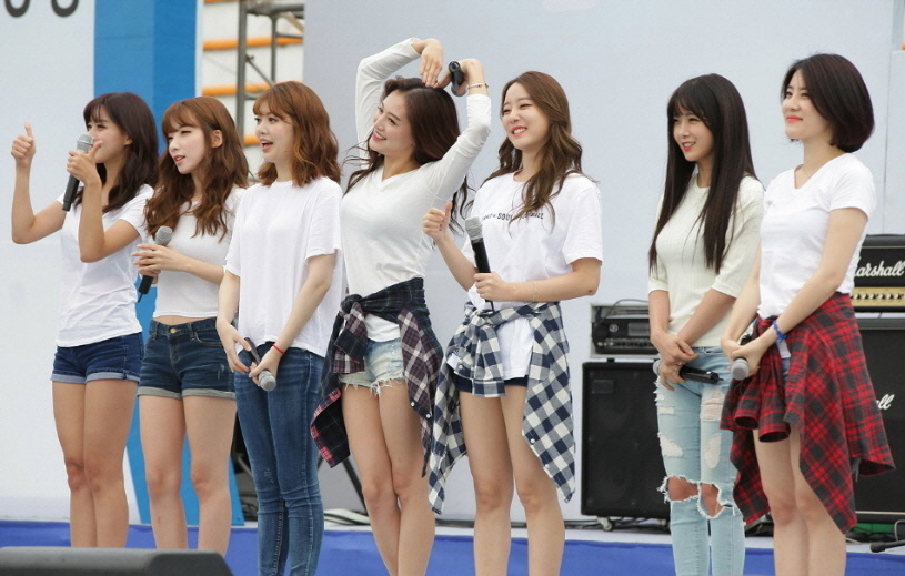 레인보우(RAINBOW) 삼성나눔워킹페스티벌 공개방송 용인종합운동장